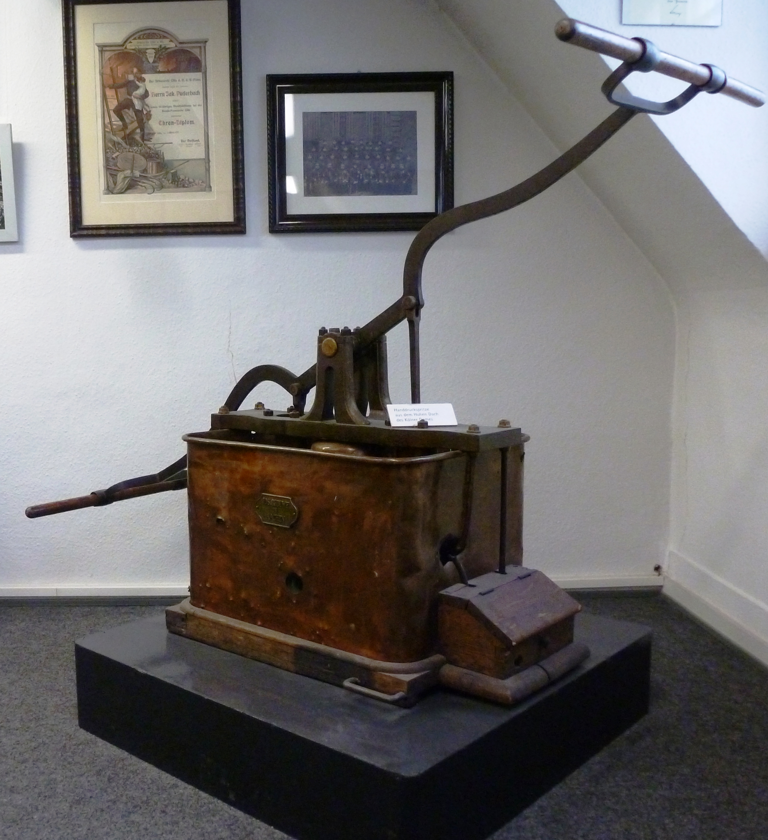 Historische Lehrsammlung der Berufsfeuerwehr Köln: Handdruckspritze aus dem hohen Dach des Kölner Doms